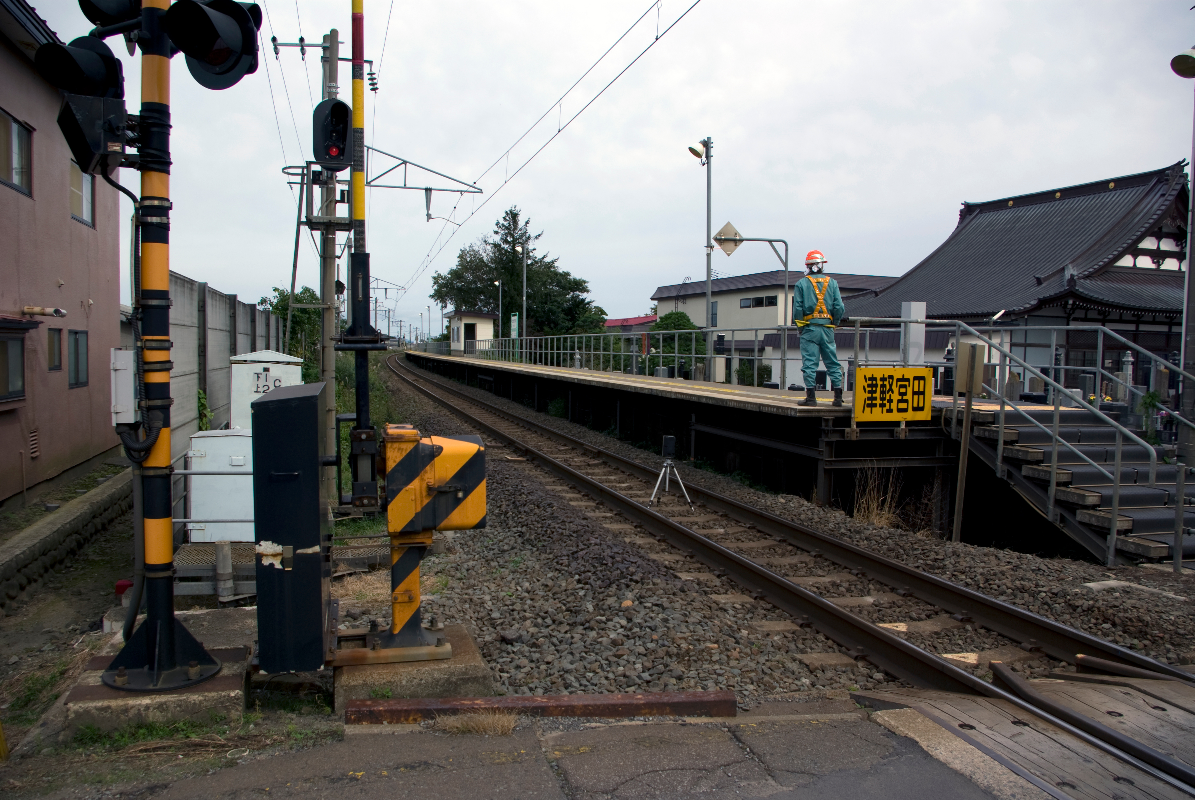 JR津軽線津軽宮田駅